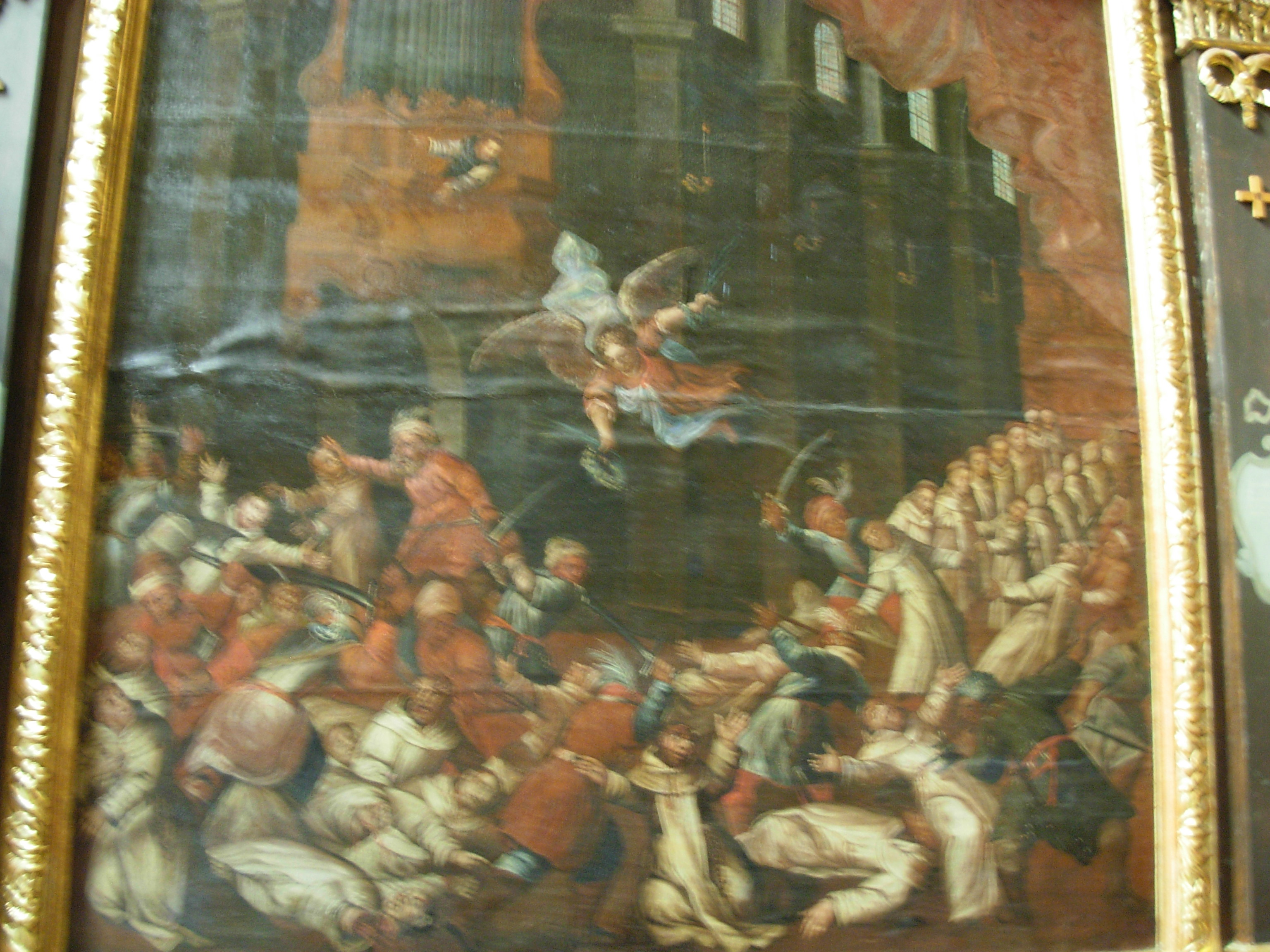 Sandomierz Cathedrali Sandomierz, Poland.